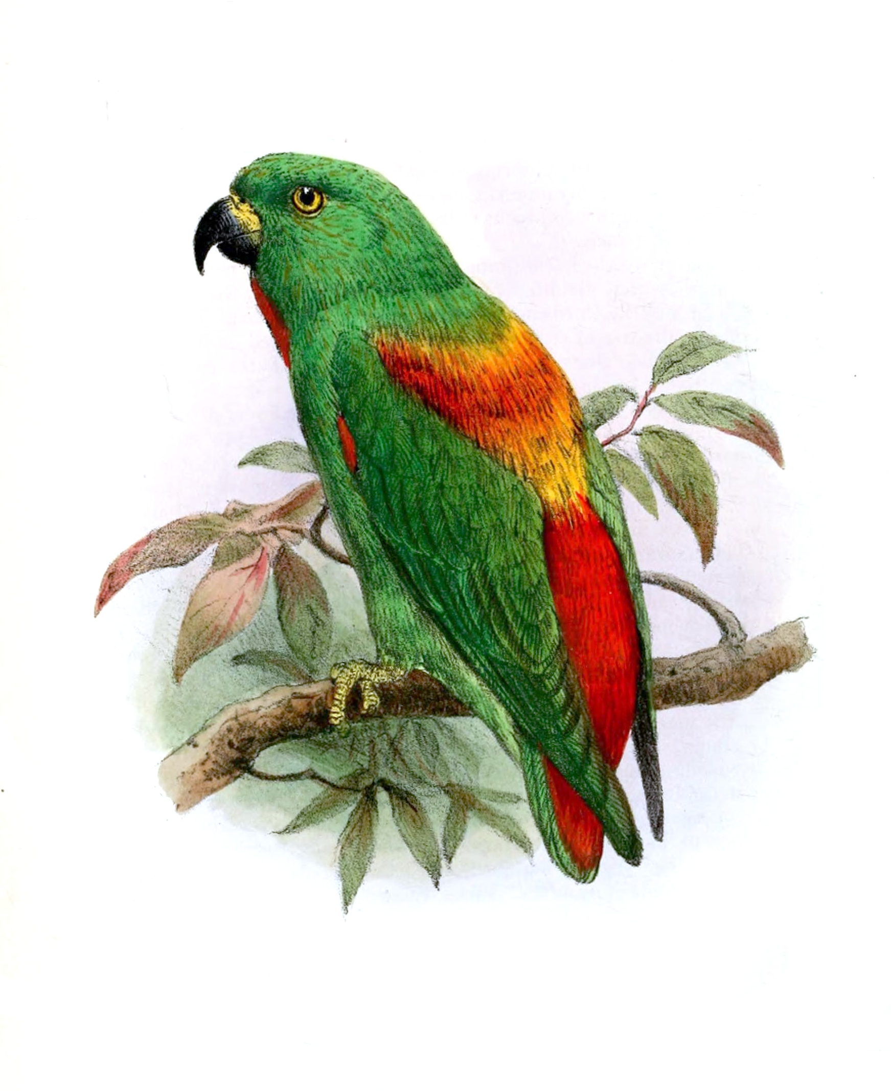 Loriculus sclateri